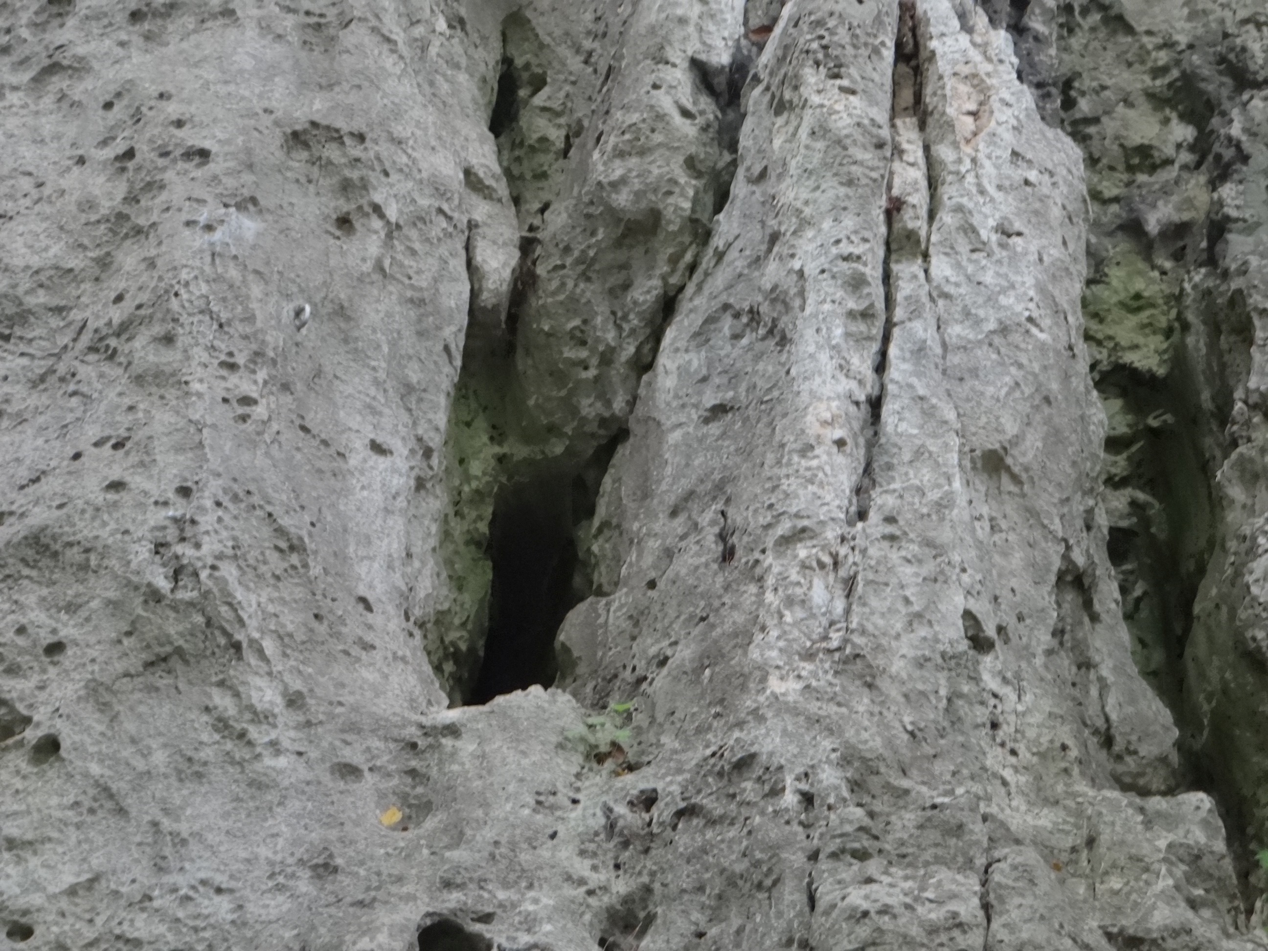 Otwór Schroniska Pionowego w Ostryszni w skale Organy w Wąwozie Ostryszni